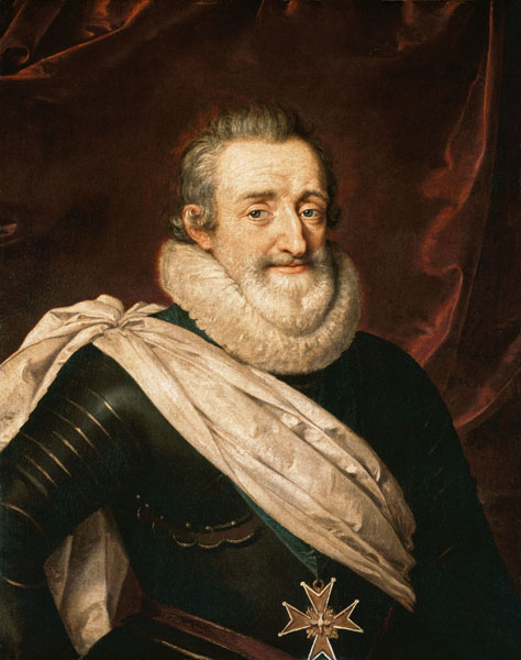 Portrait en buste du roi Henri IV portant en écharpe la bannière blanche et la croix de l'Ordre du Saint-Esprit.